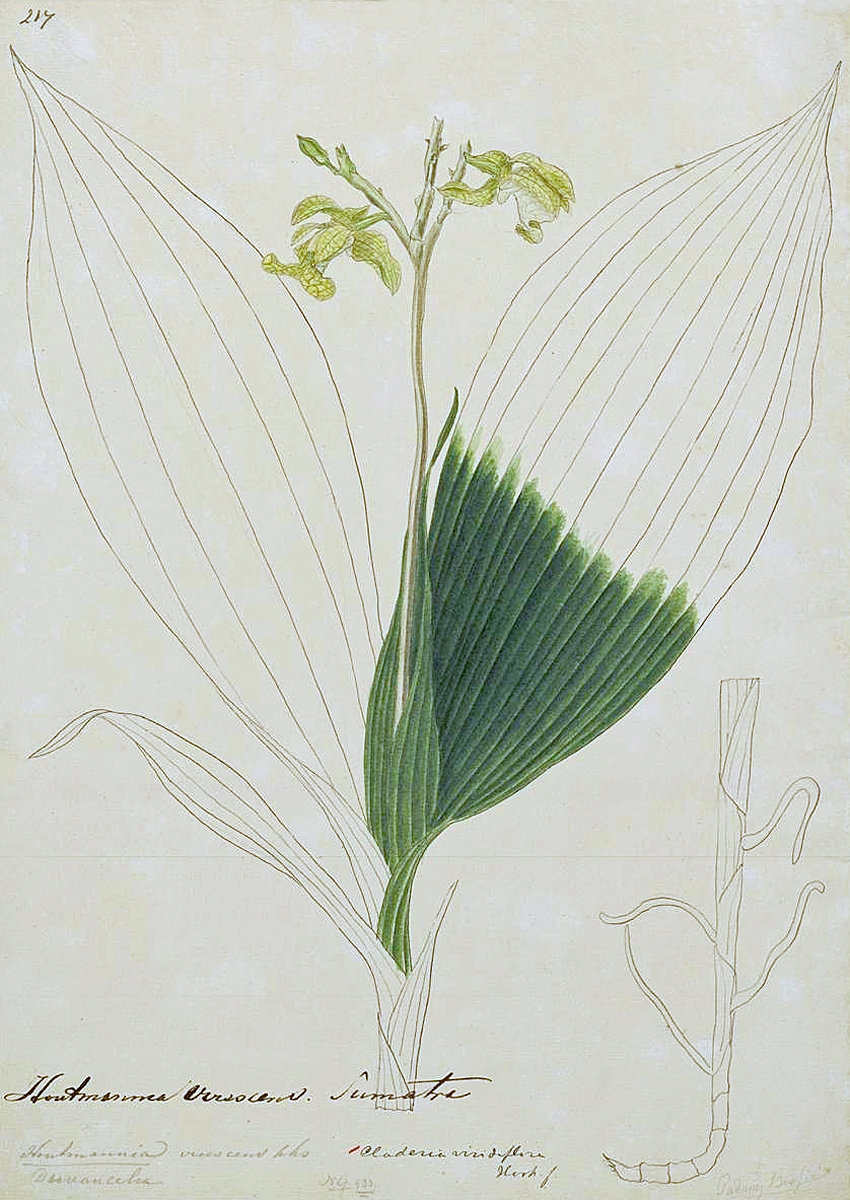 Claderia viridiflora